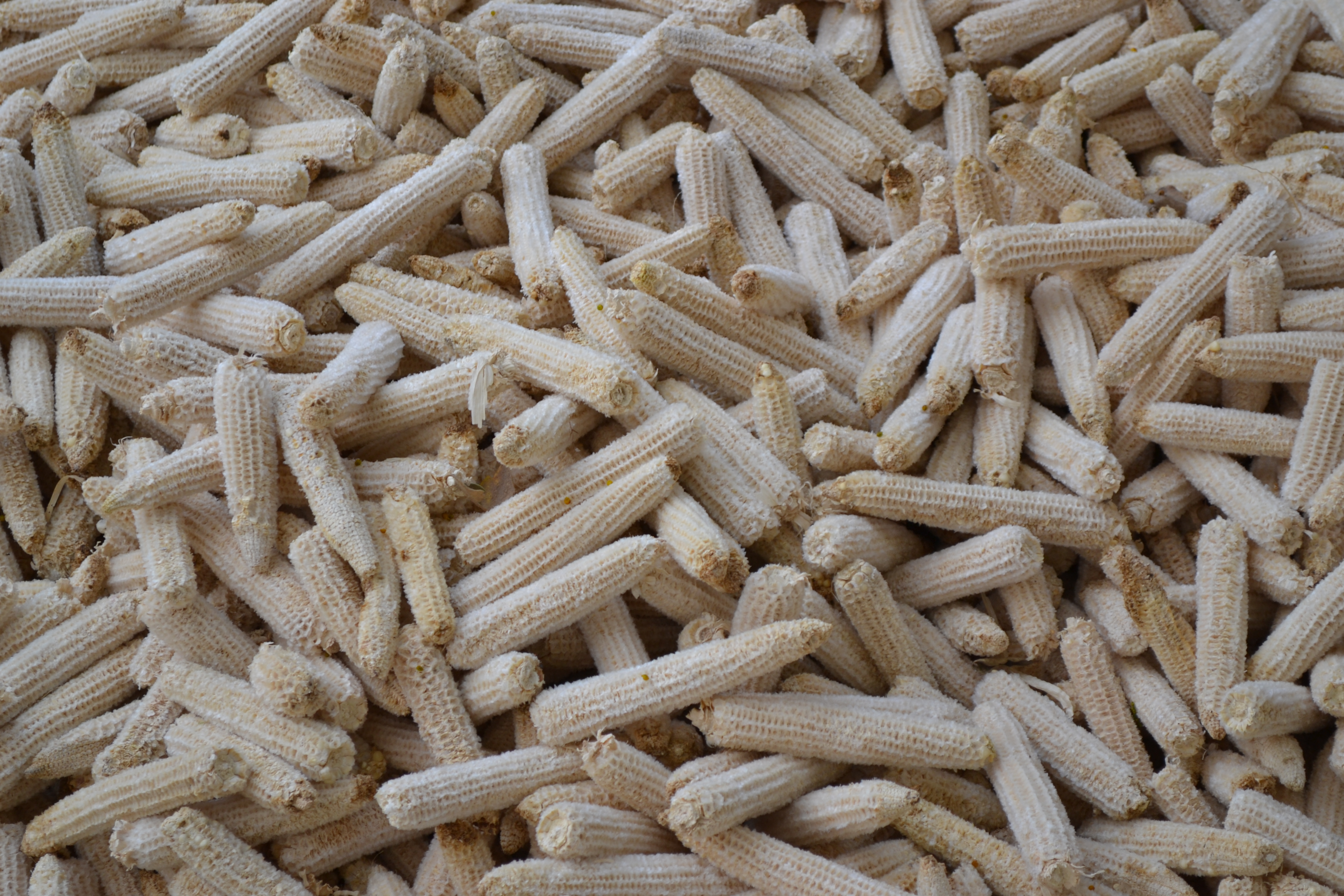 Olotes de maíz amontonados.